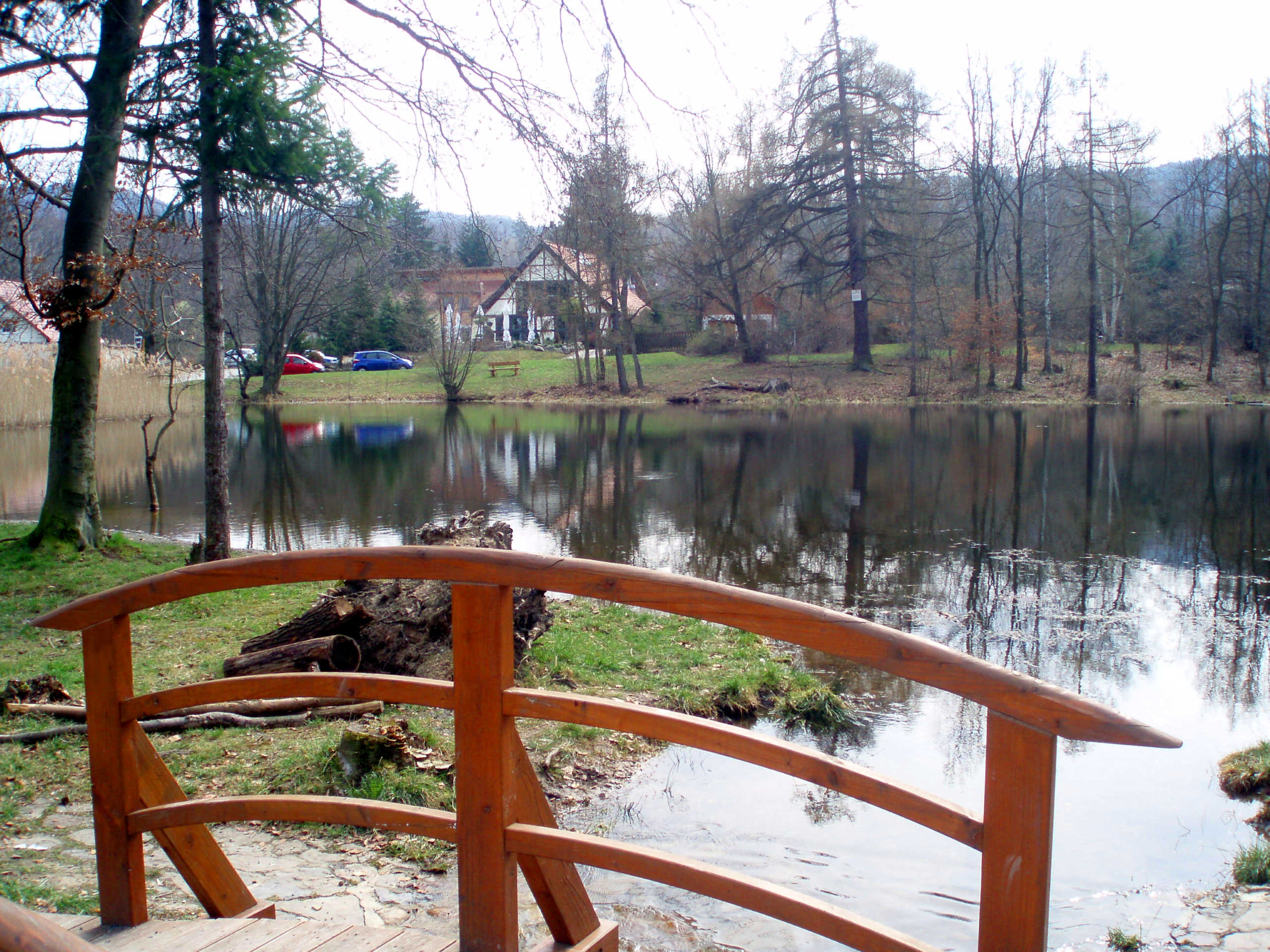 Tonmühlenteich